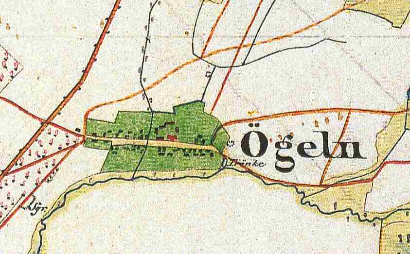 Oegeln, Ortsteil der Stadt Beeskow, Lkr. Oder-Spree, Brandenburg, Deutschland, Ausschnitt aus dem Urmesstischblatt 3851 Beeskow von 1846